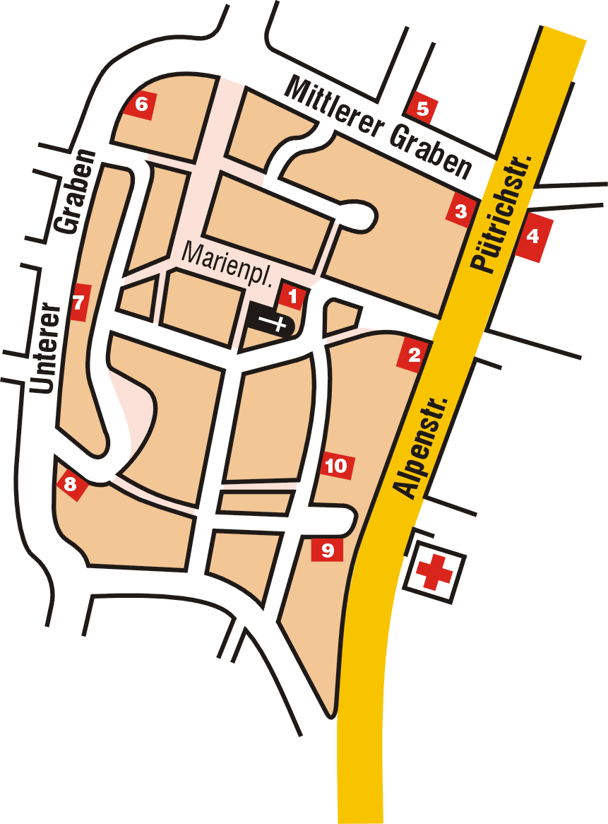 Ein Übersichtsplan von Weilheim in Oberbayern